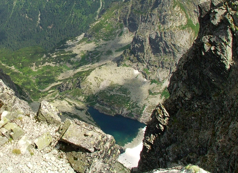 Zmrzlé pleso somere.